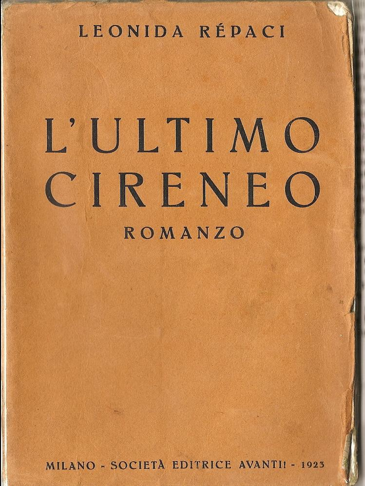 Leonida Repaci, L'Ultimo Cireneo, Avanti! 1923